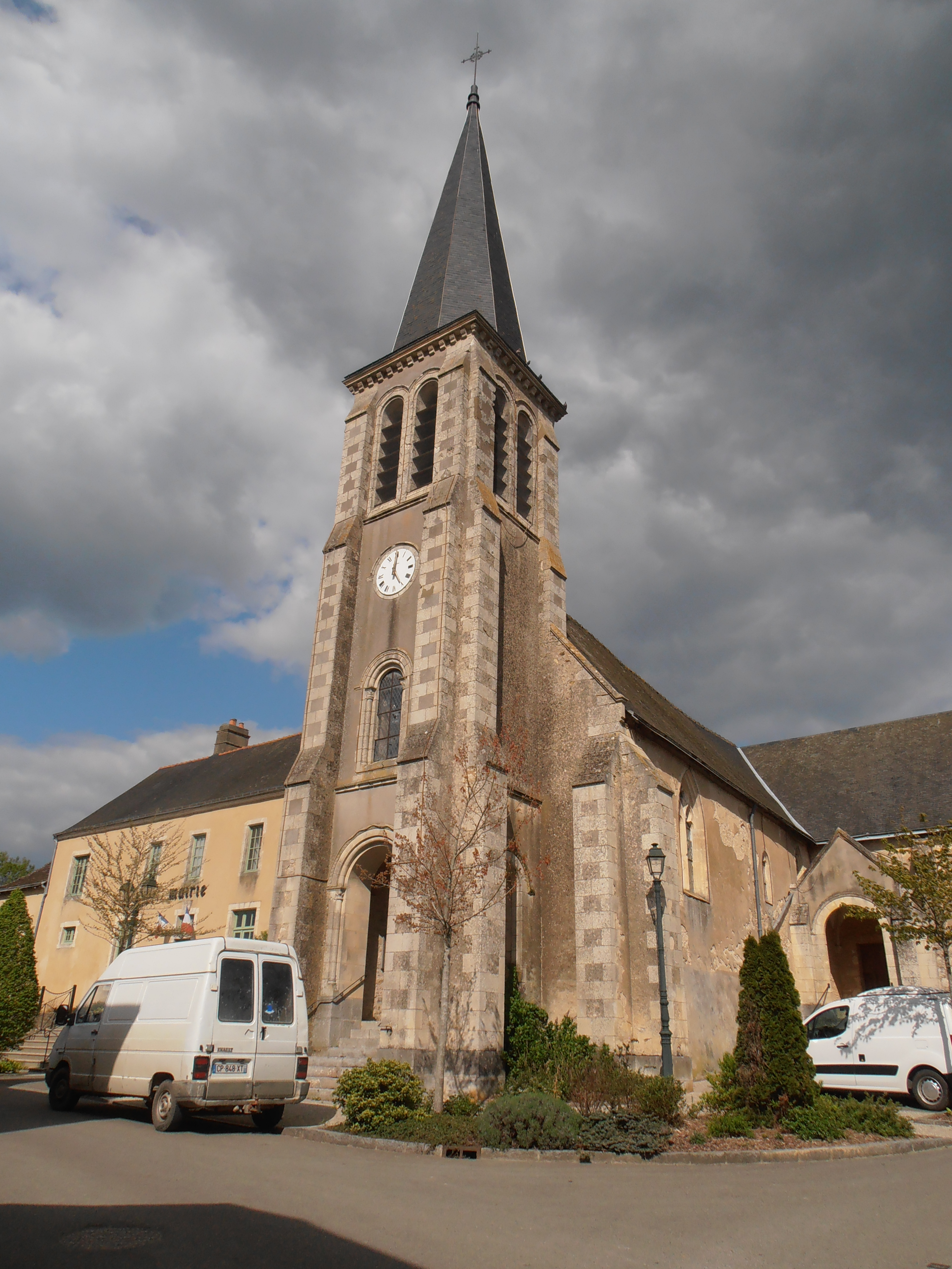 L'église de Maigné